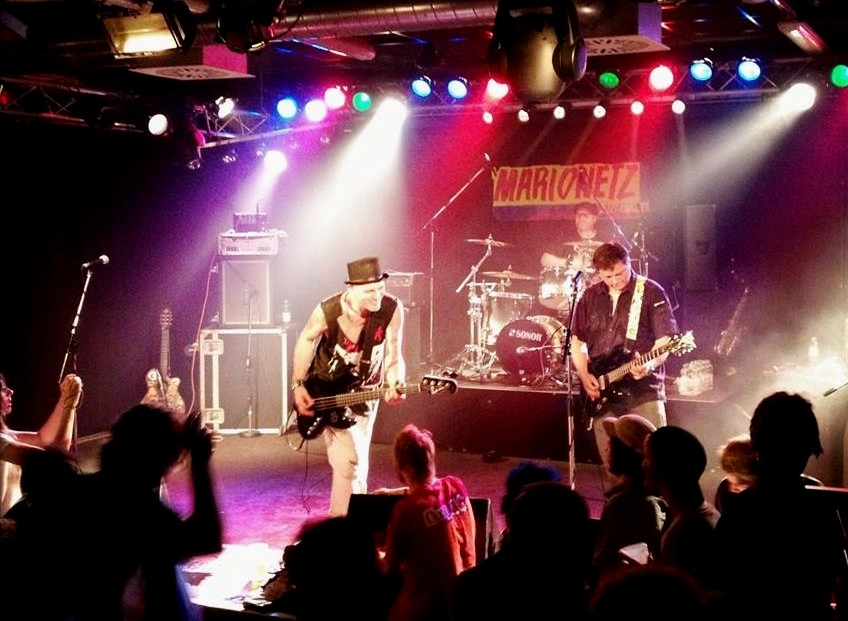 Marionetz2013 live Sigi Pop, Manny B, Chrissi Bischoff